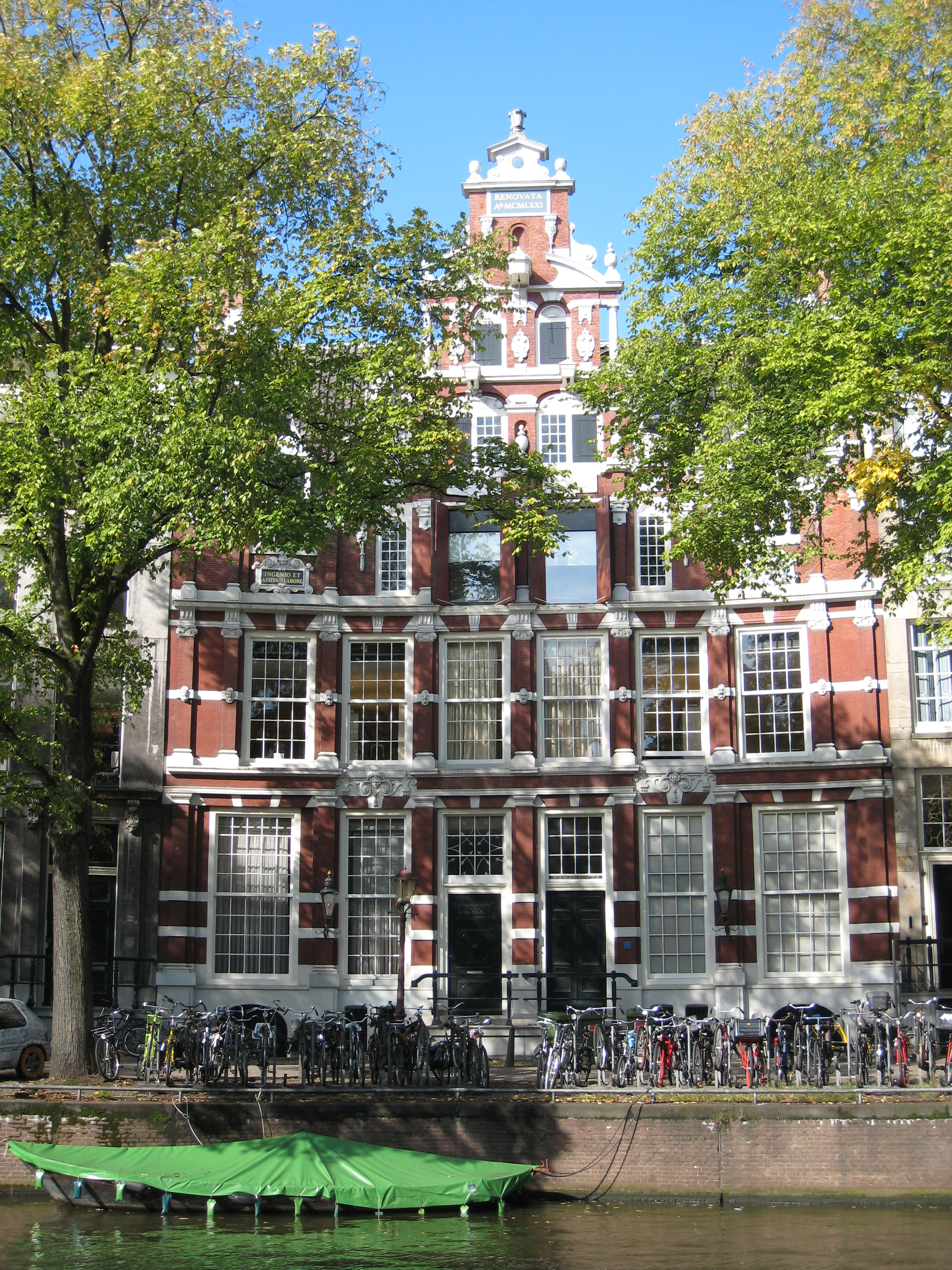 Het Huis Bartolotti (ook Het Bonte Huis) is een grachtenhuis aan de Herengracht 170-172 te Amsterdam.